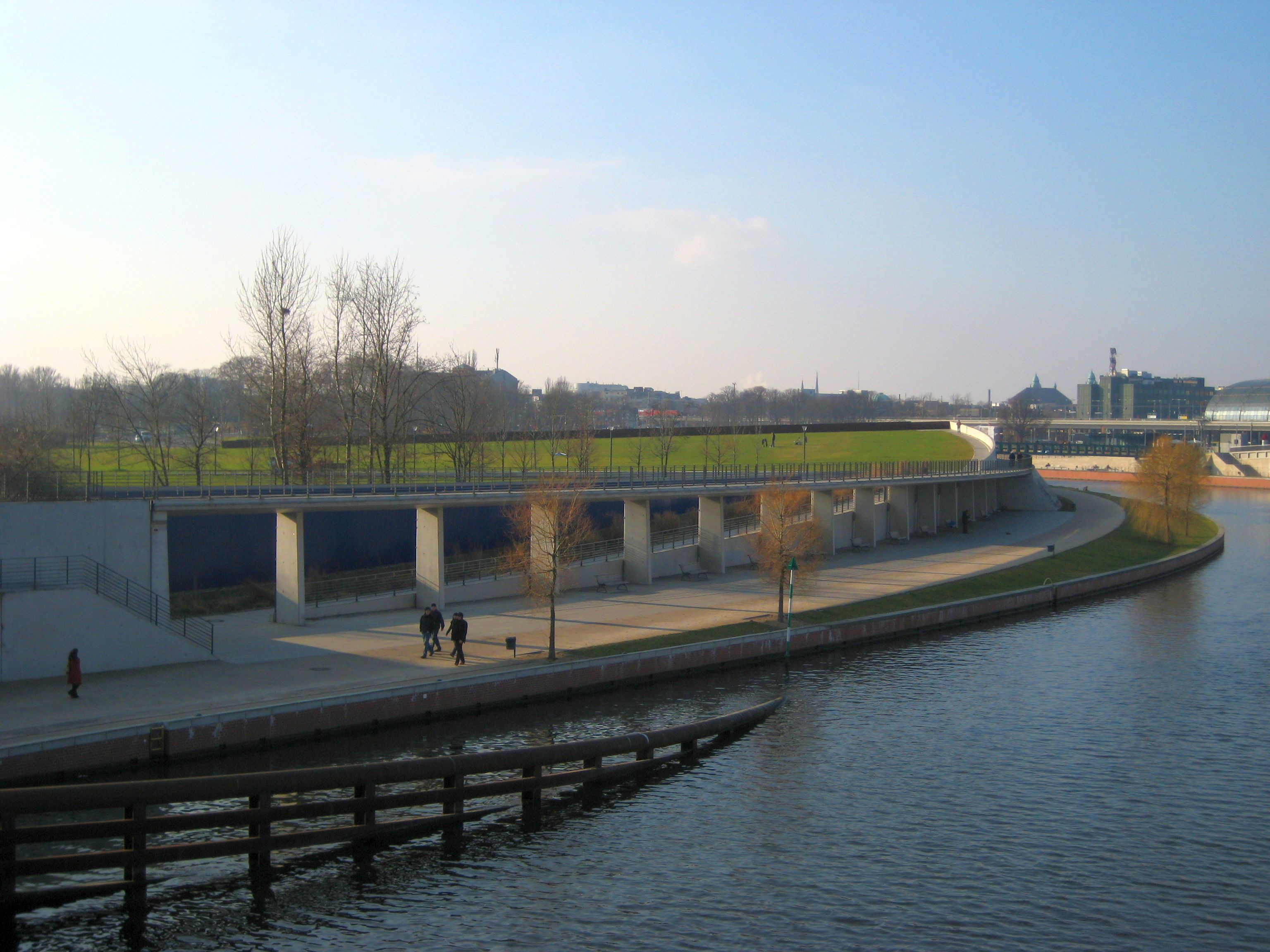 waterside of Spreebogenpark in Berlin